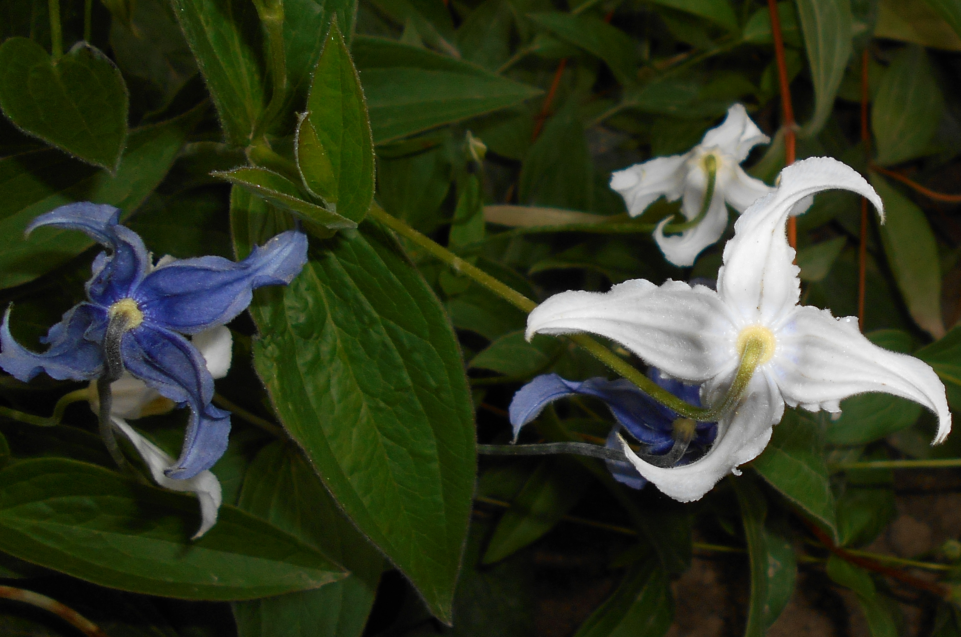 Powojnik całolistny (Clematis integrifolia). Ogród Botaniczny UMCS, Lublin.